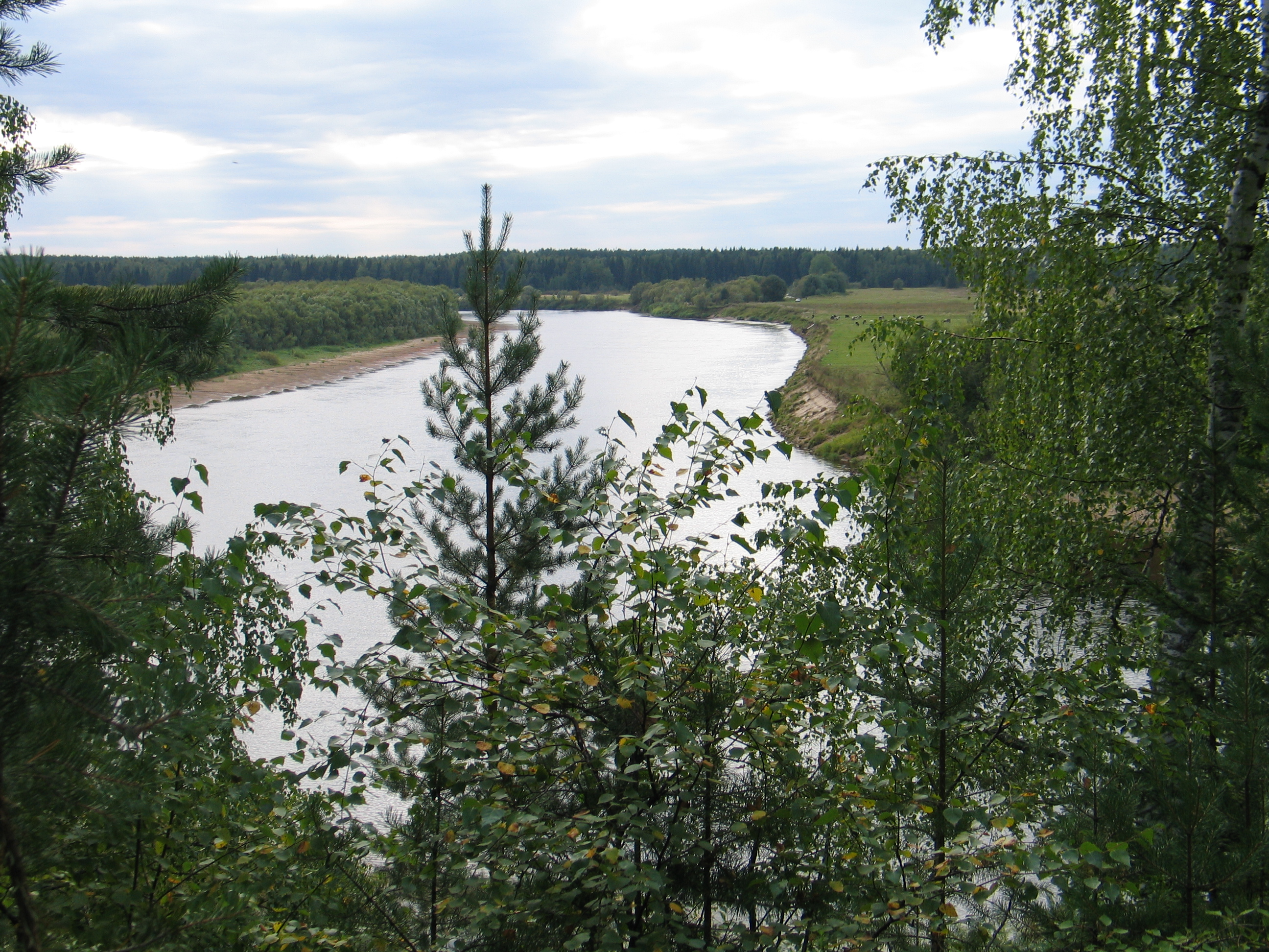 Река Язьва с притоком Глухой Вильвой: Красновишерский район, Пермский край This image is related to the protected area of Russia number 5910207